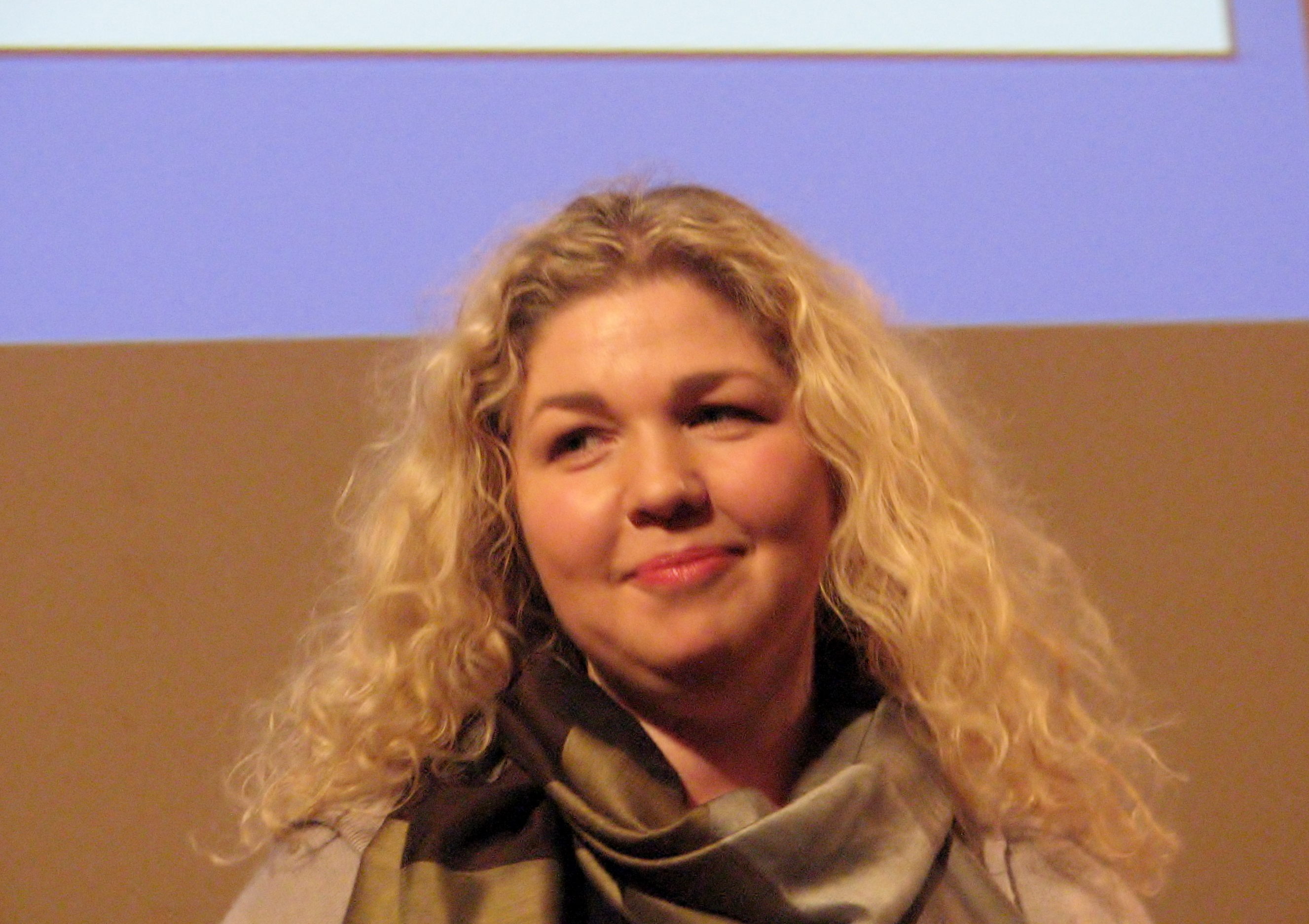 Maarja Tali tutvustamas raamatukoer Susit kirjandusfoorumil "Kas laps loeb?"